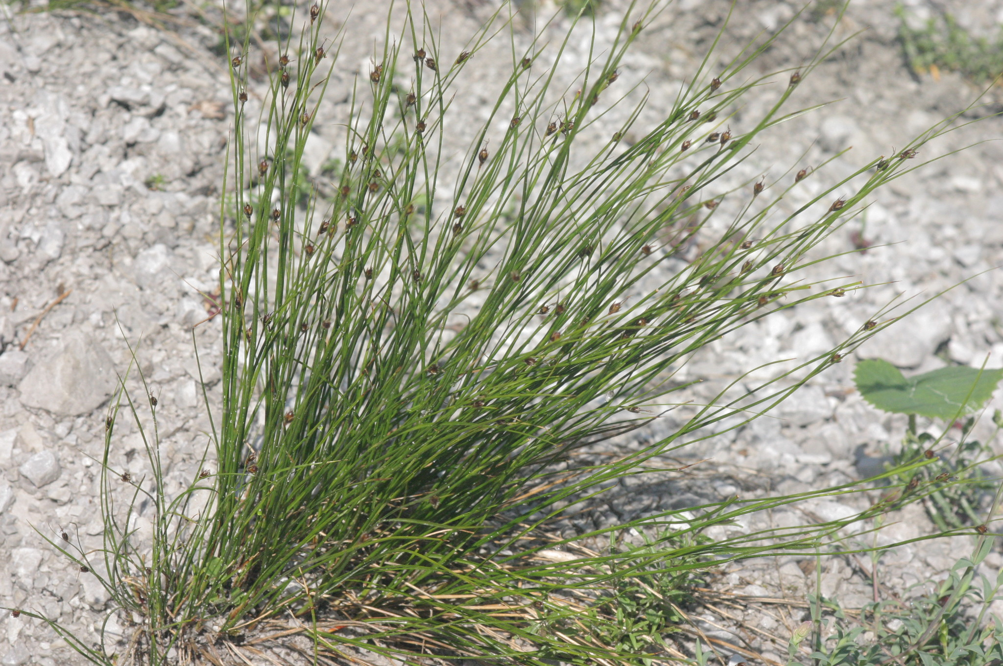 Juncus monanthos (Einblüten-Simse) Aufnahmeort: Haindlkar/Gesäuse, Steiermark, Austria